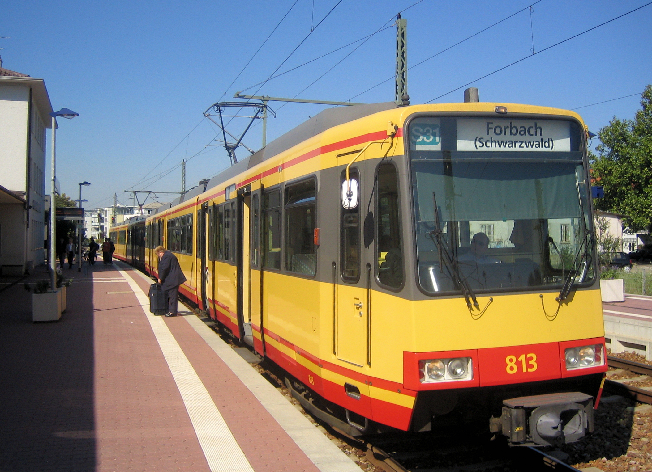 Stadtbahn im Bf. Gaggenau, selbst fotografiert